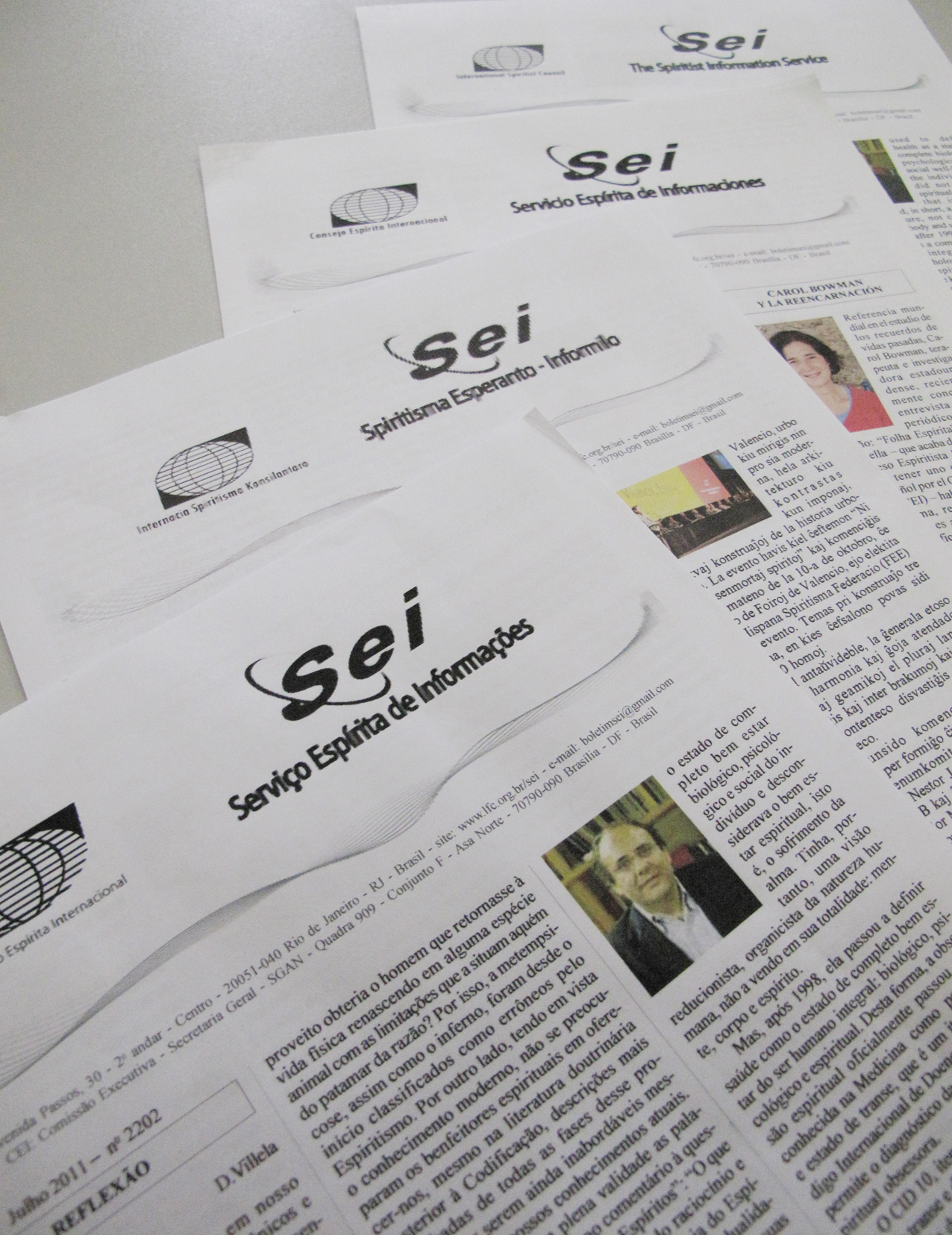 Edições do SEI em língua portuguesa, esperanto, castelhano e inglês.